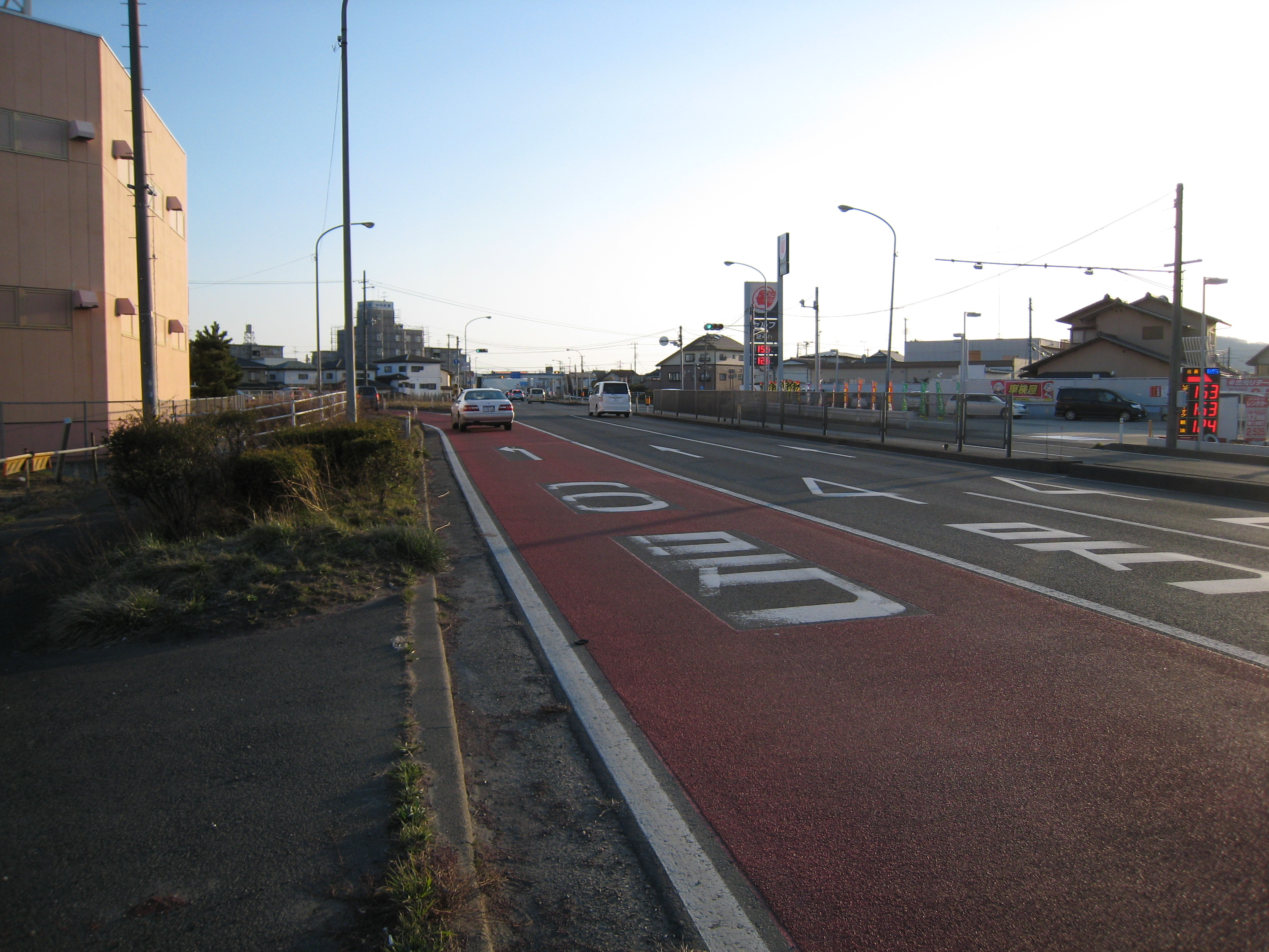 国道4号と6号の合流点（岩沼市藤浪一丁目）